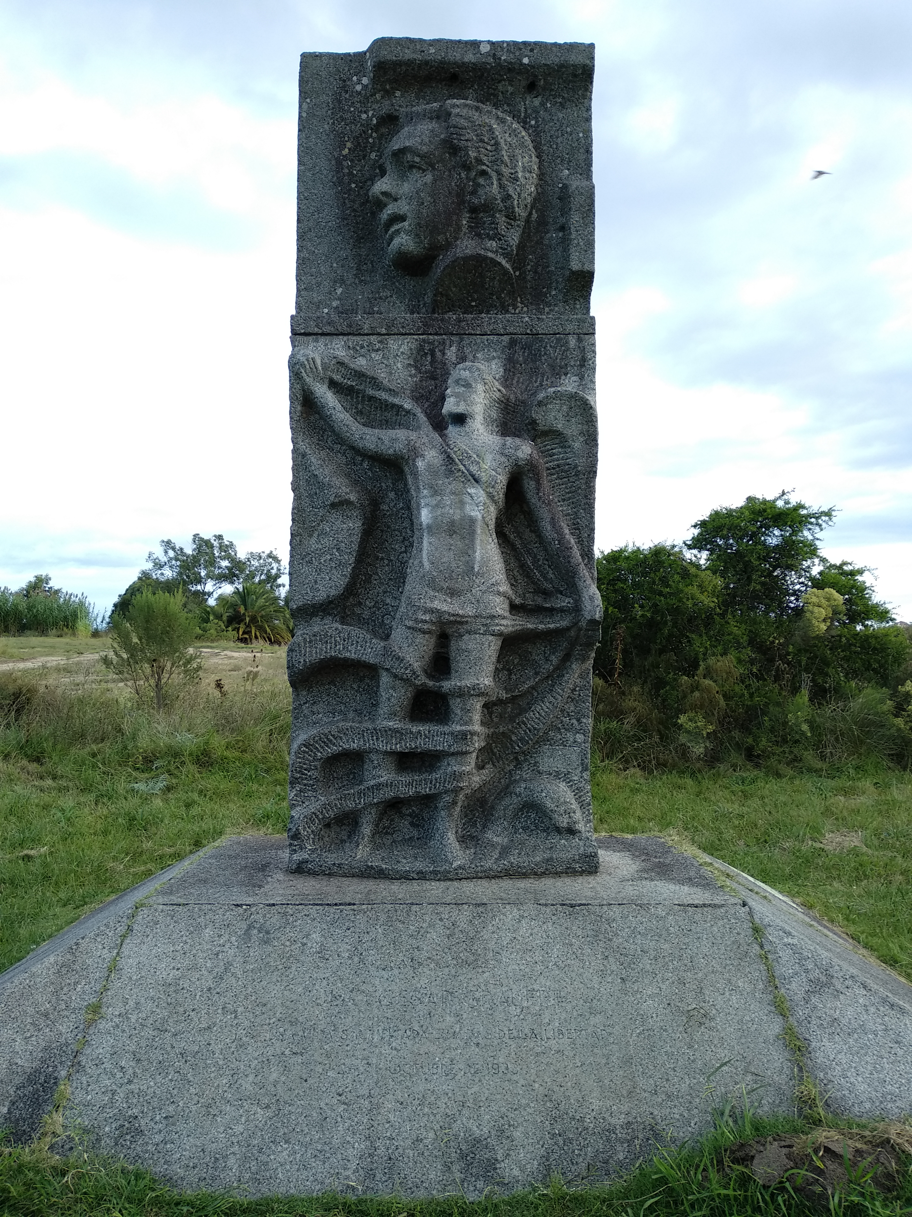 Monumento homenaje a Julio César Grauert. Sobre la Ruta 8 Vieja en las cercanías de la ciudad de Pando, Uruguay. En el pedestal dice: "Julio César Grauert. Una vida sacrificada en aras de la libertad. Octubre de 1933".